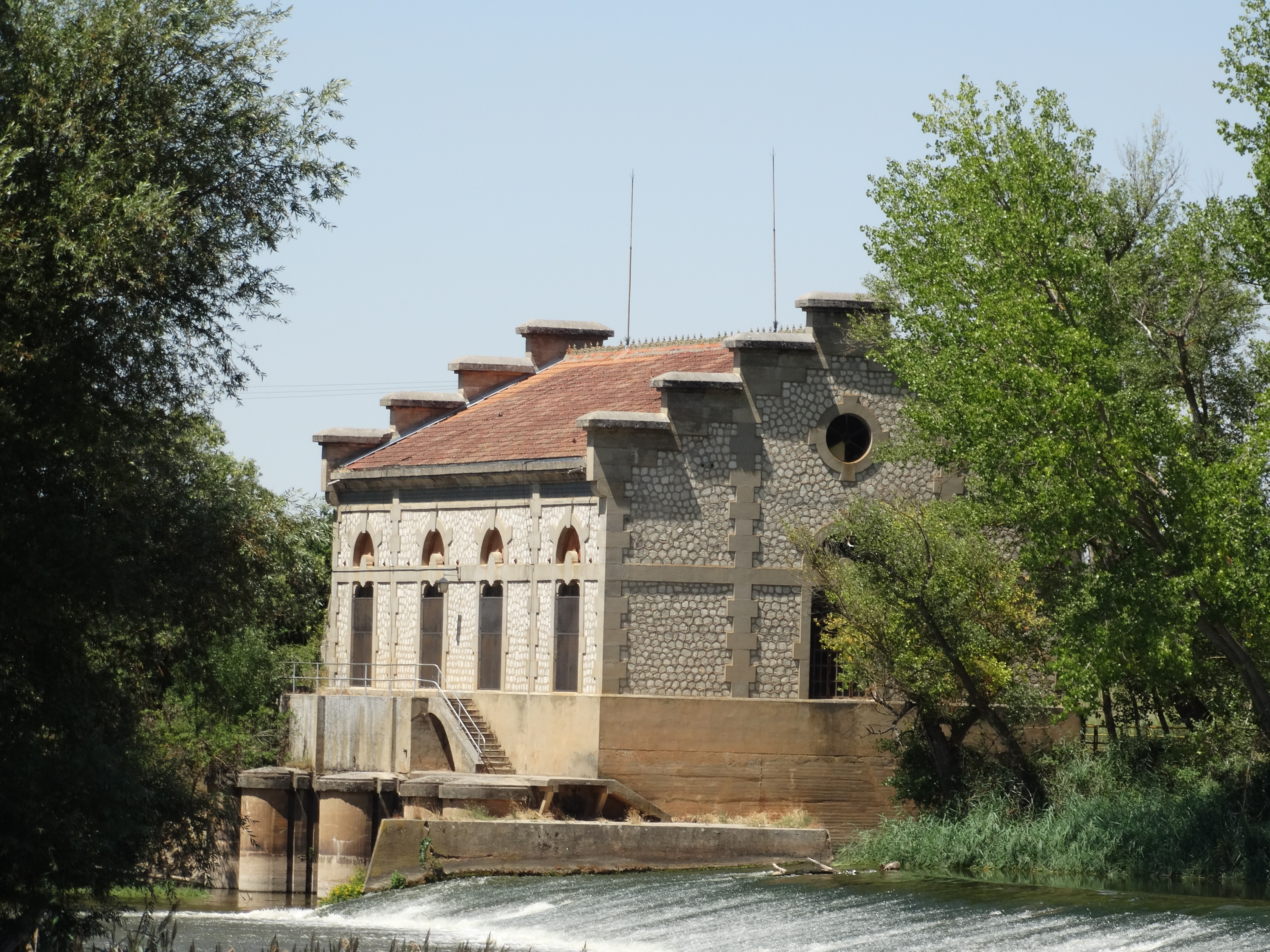 Edificio de una central eléctrica de 1930, en el río Duero, en el término de Villamuriel y frente al despoblado de Aniago en Valladolid (España).